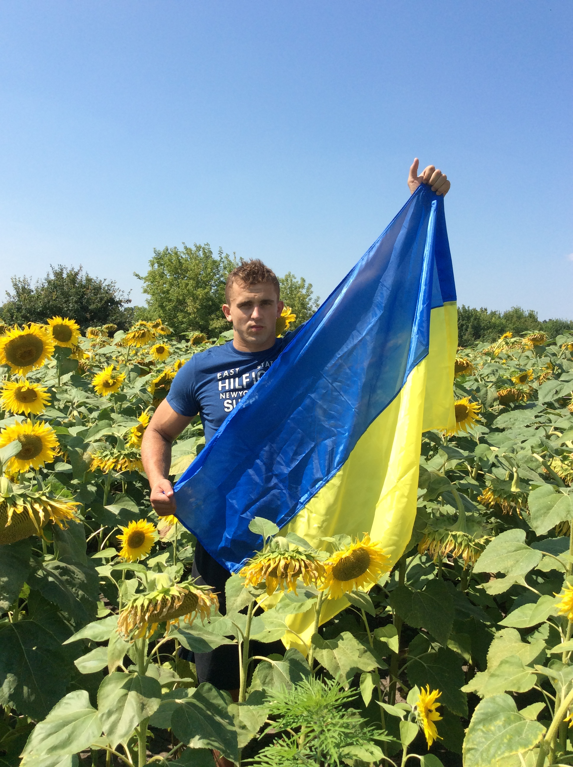 Олександр